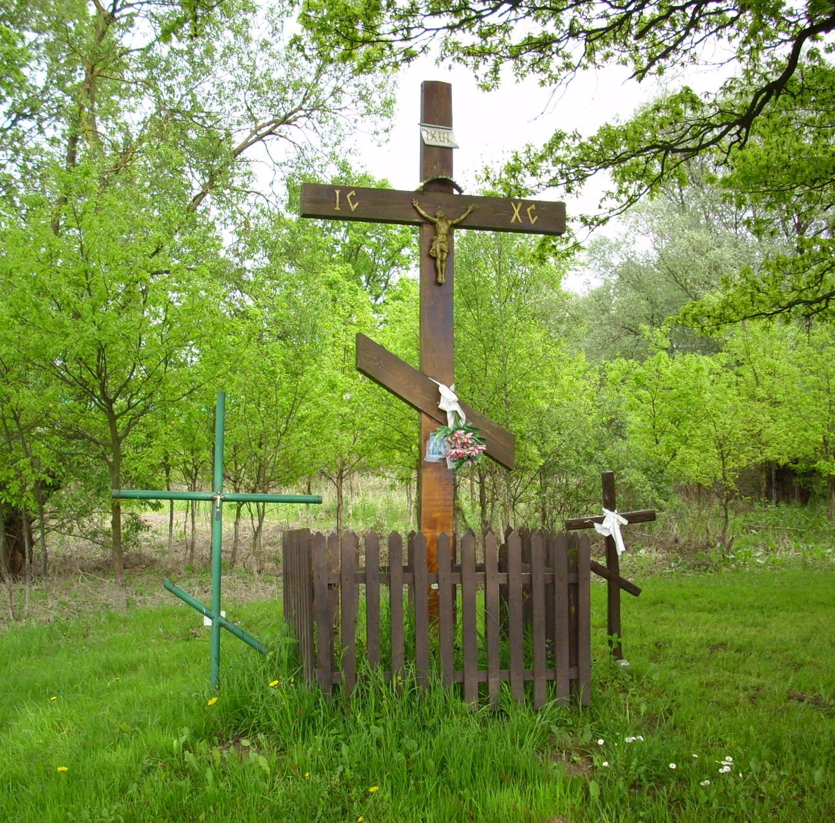 Krzyże przydrożne przy sanktuarium w Jabłecznej.